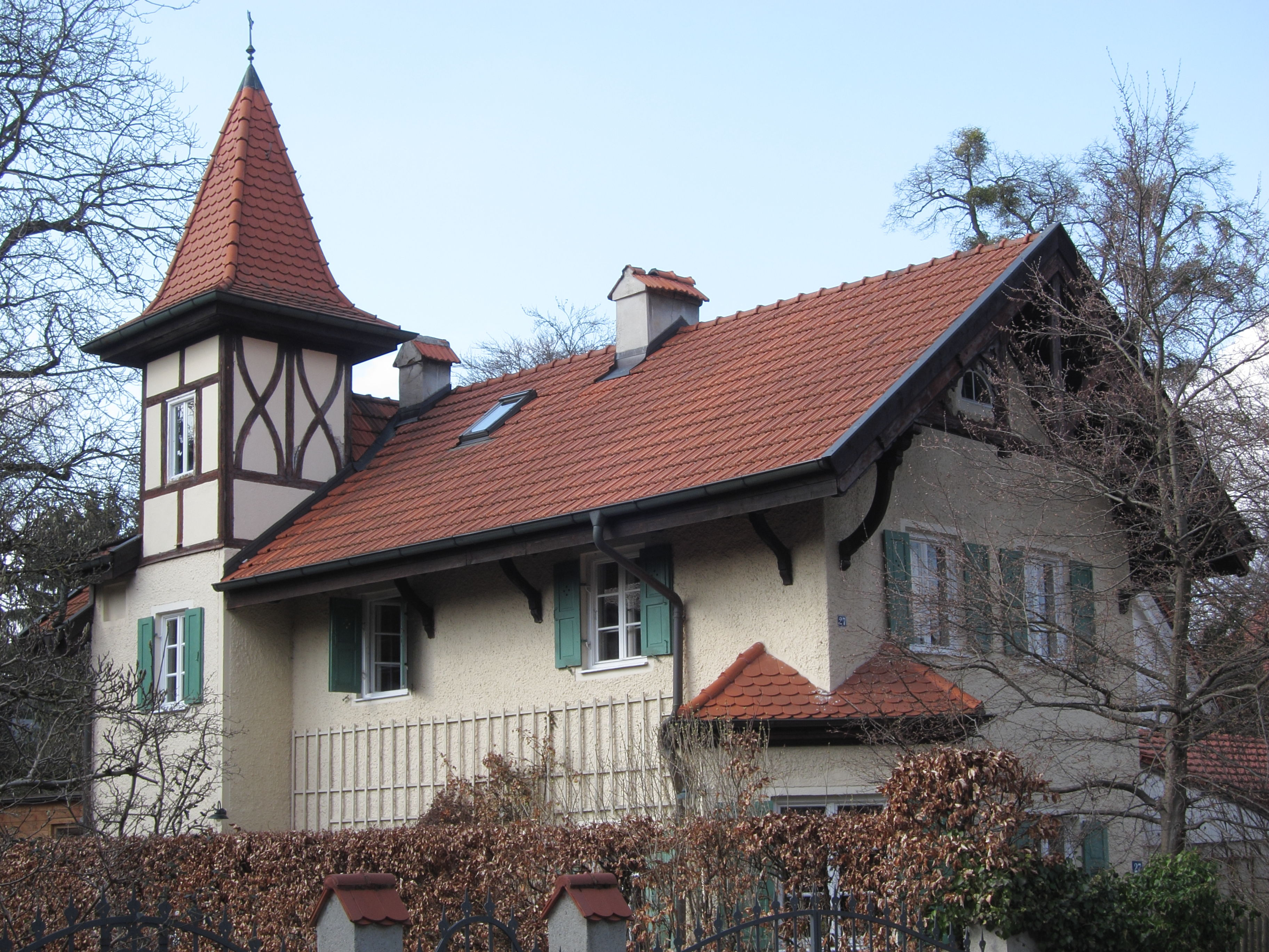 Floßmannstraße 27; Fachwerkvilla, mit Turm, um 1895 aus dem Büro August Exter.